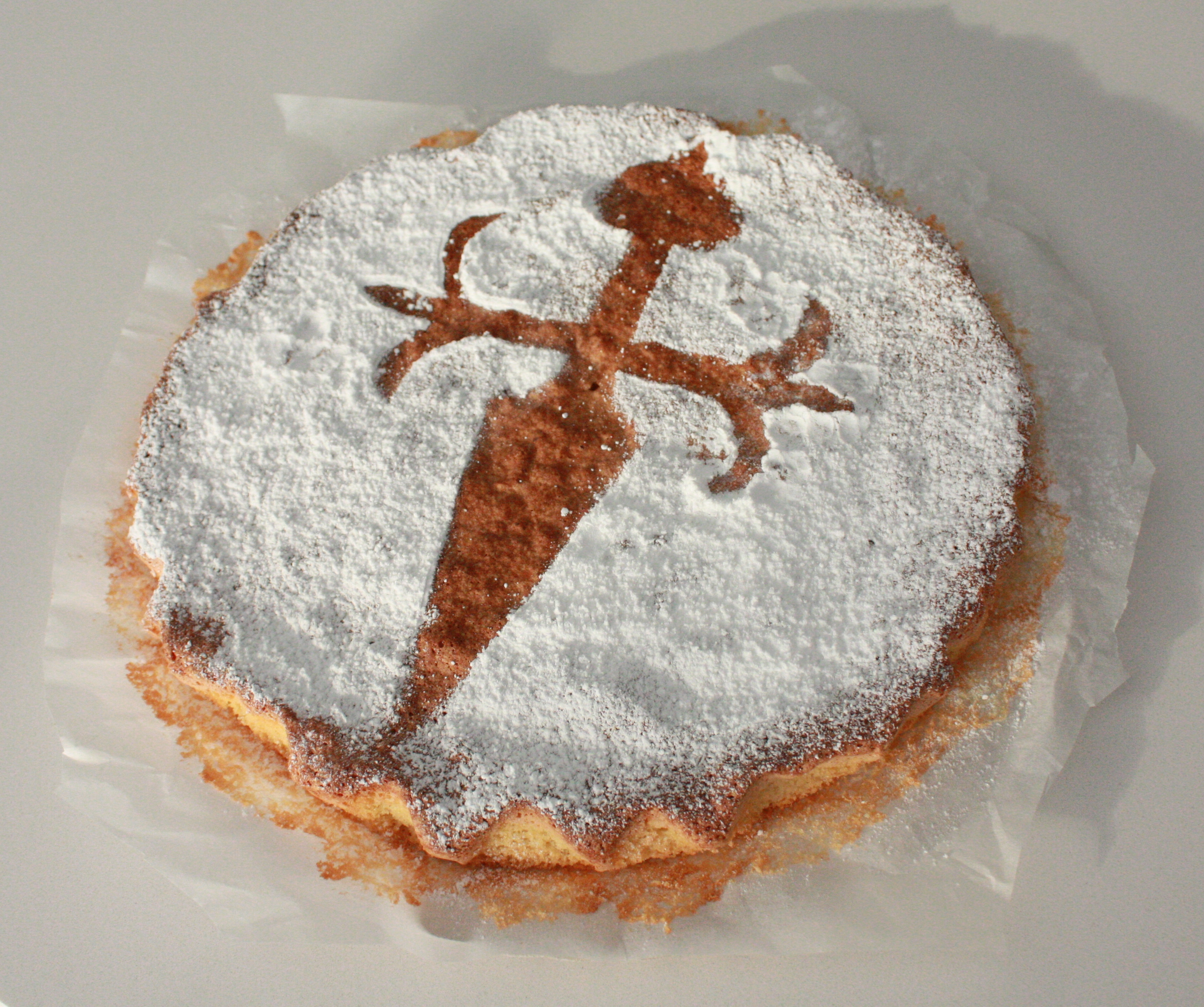 Tarta de Santiago (imagen recortada de la original).